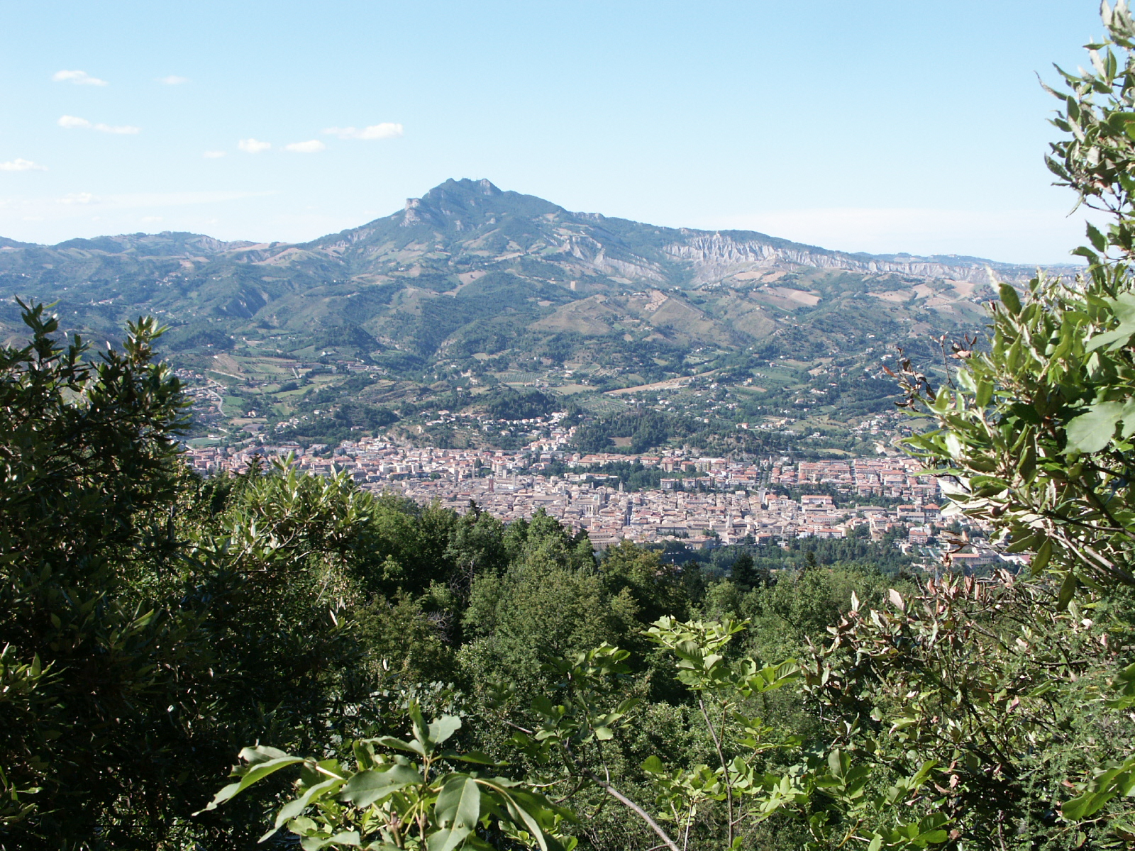 Panorama su Ascoli e sul Monte dell'Ascensione dall'Eremo di San Marco. Autore: Maurizio Antonelli